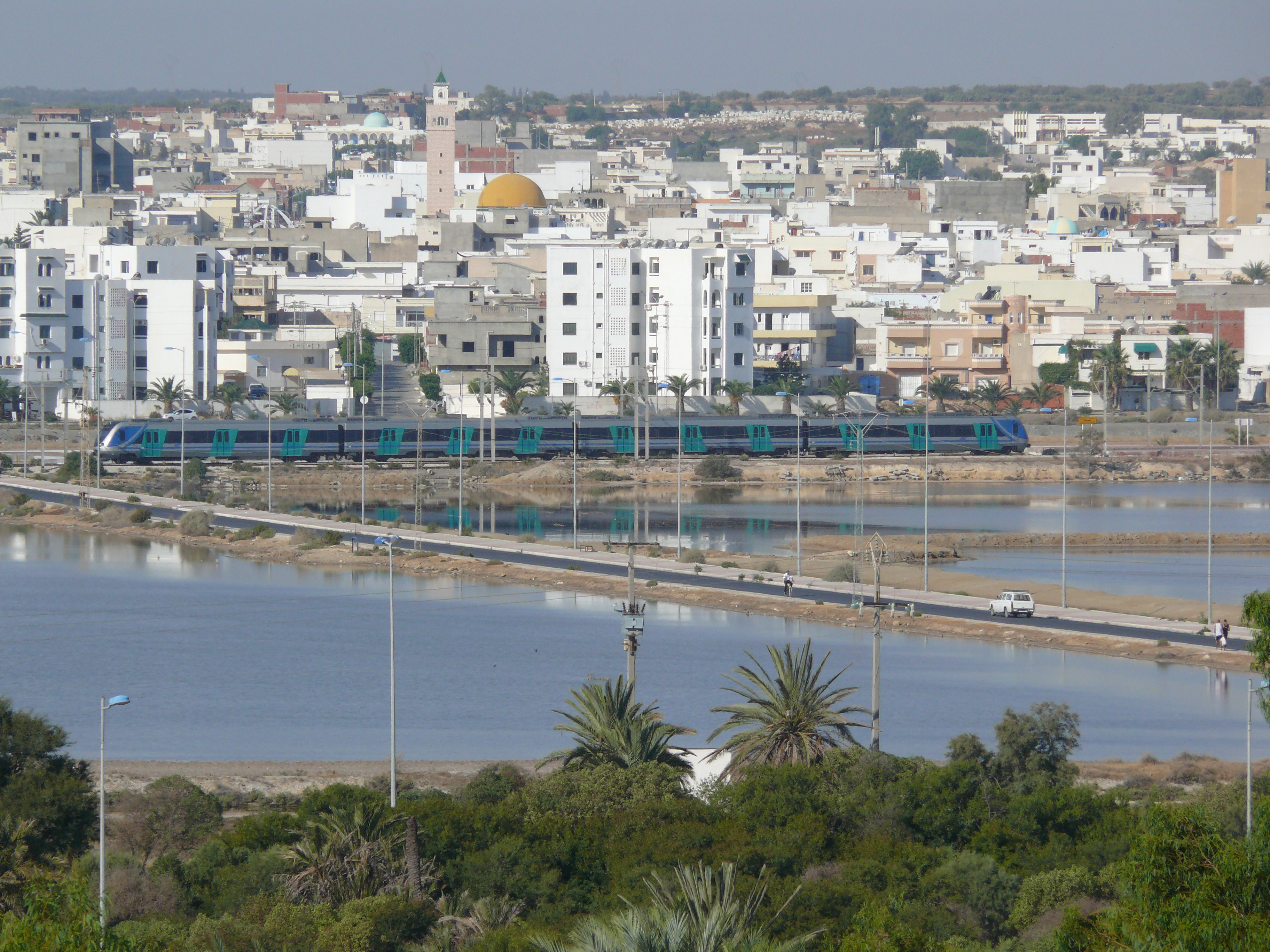 Zoutpannen in Sousse